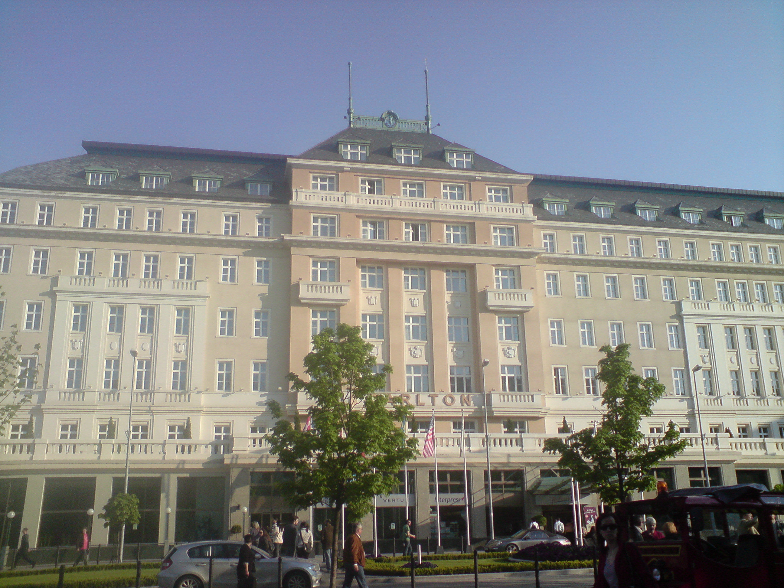 Hotel Carlton, Hviezdoslavovo námestie, Bratislava